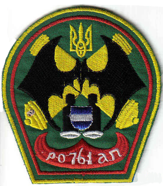 Емблема 761-го ороап